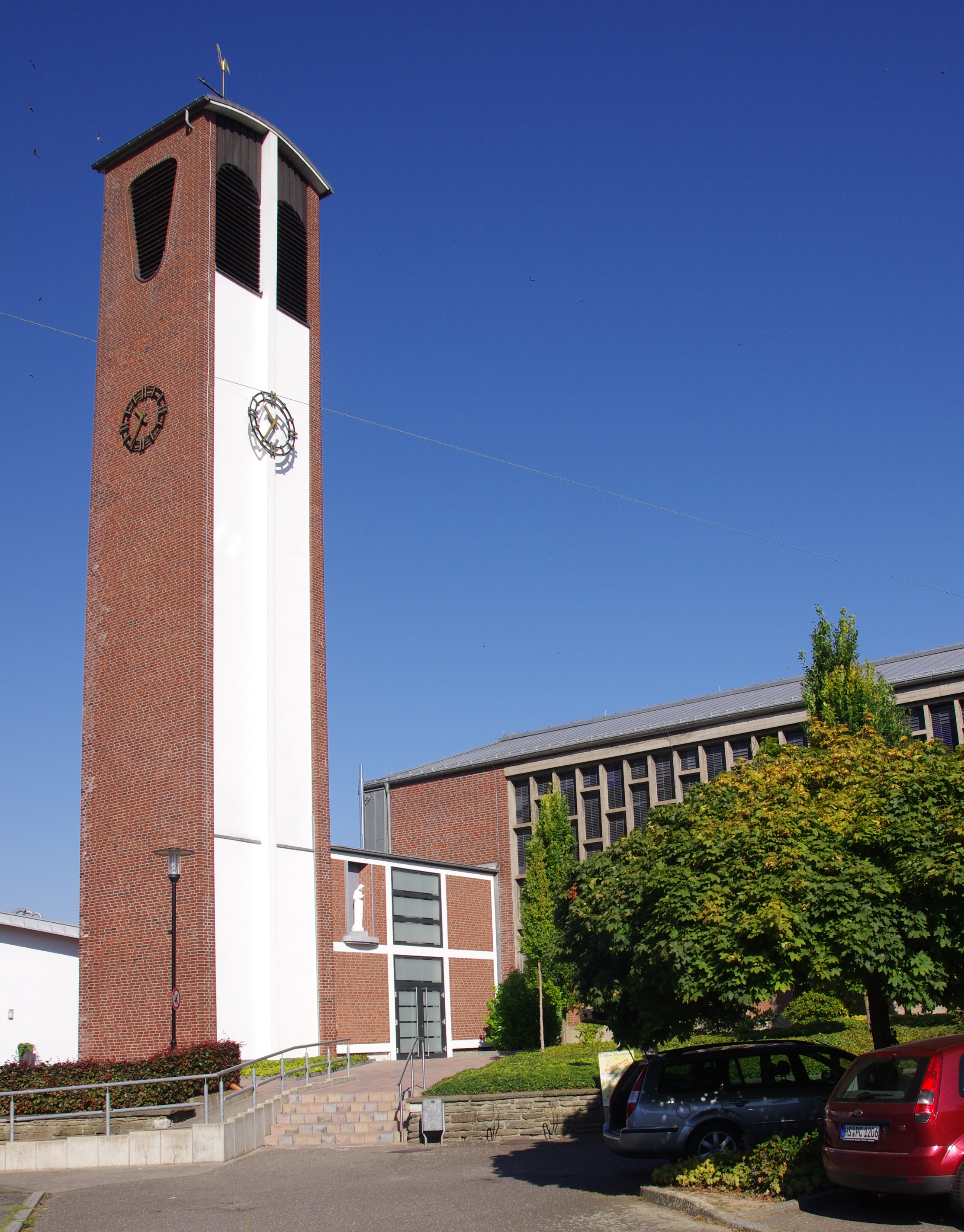 Kirche St. Peter Immendorf. Es handelt sich um eine spätgotische Choranlage in Backstein mit drei polygonalen, unterschiedlich tiefen Chören. Hauptchor um 1500, Neubau 1955/56. This is a photograph of an architectural monument.